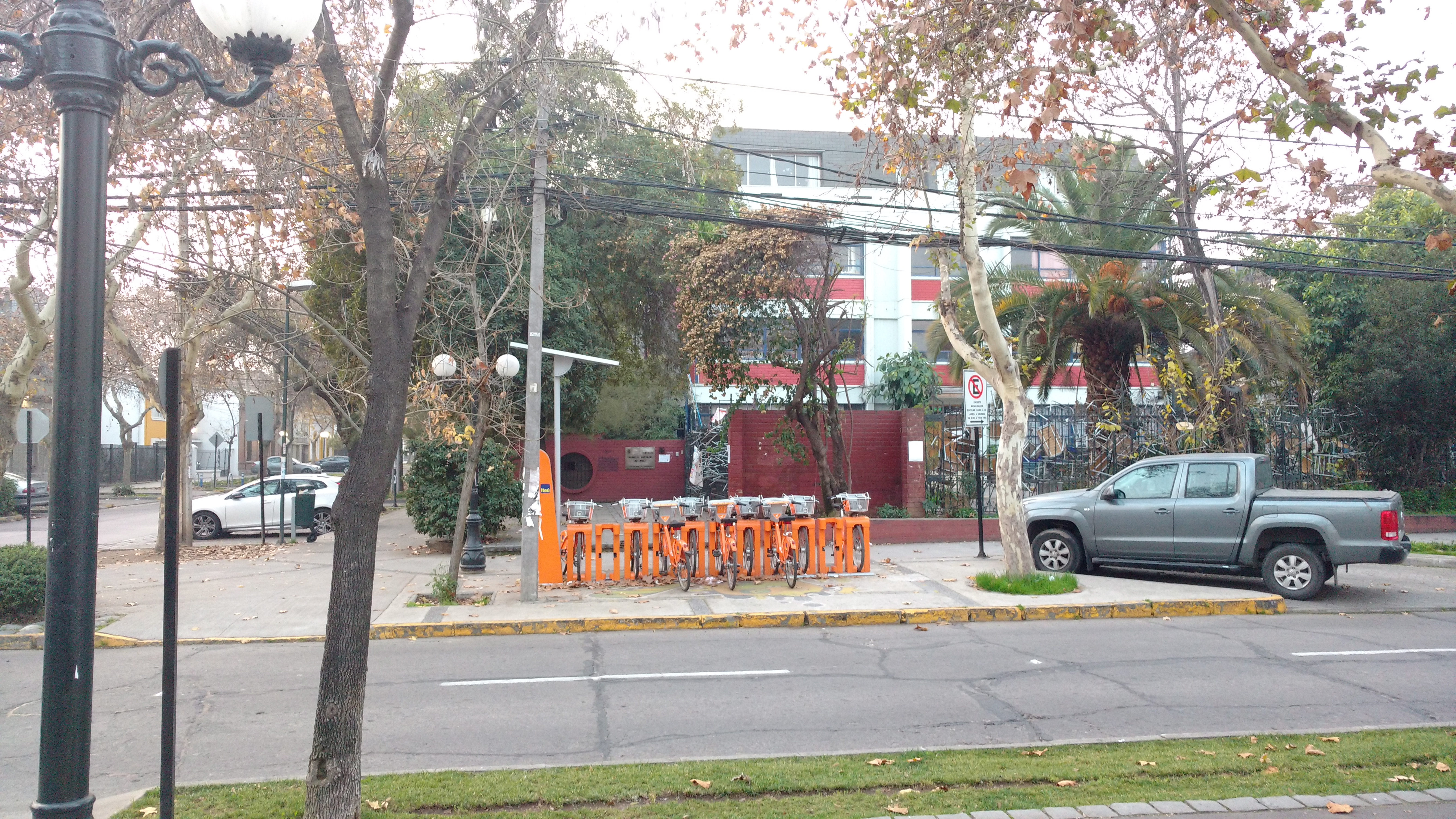 Liceo Carmela Carvajal de Prat en Barrio Italia